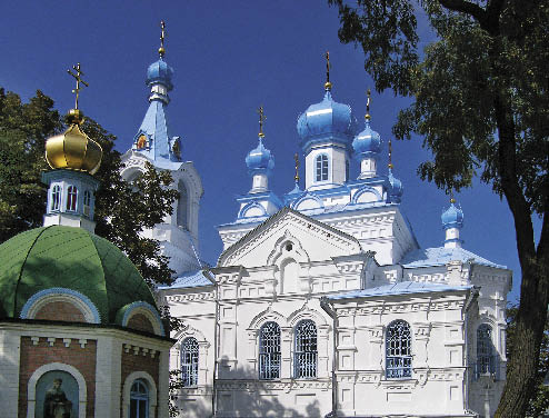 Собор Святого Духа. Свято-Духівський монастир-скит Почаївської Лаври